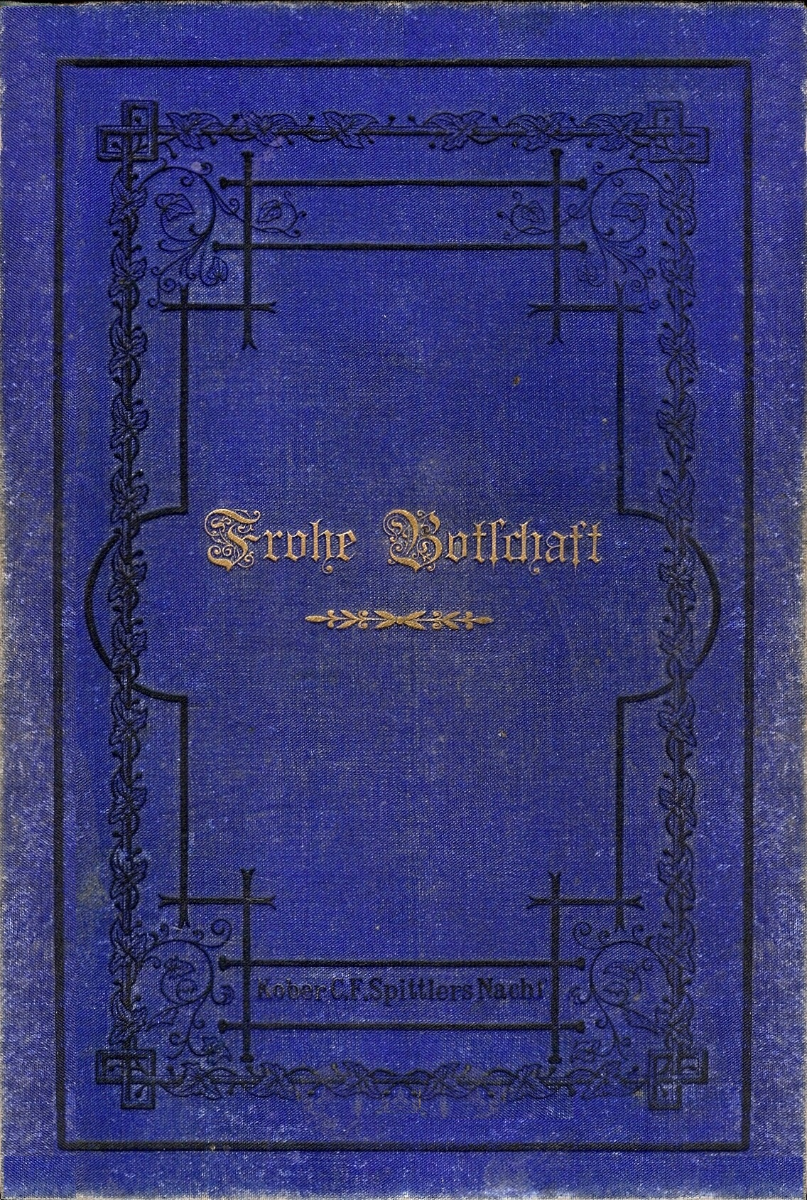 Ernst Gebhardt - Frohe Botschaft in Liedern, Geistliche Lieder aus den Vereinigten Staaten von Amerika, ins Deutsche übertragen, Basel, 1912